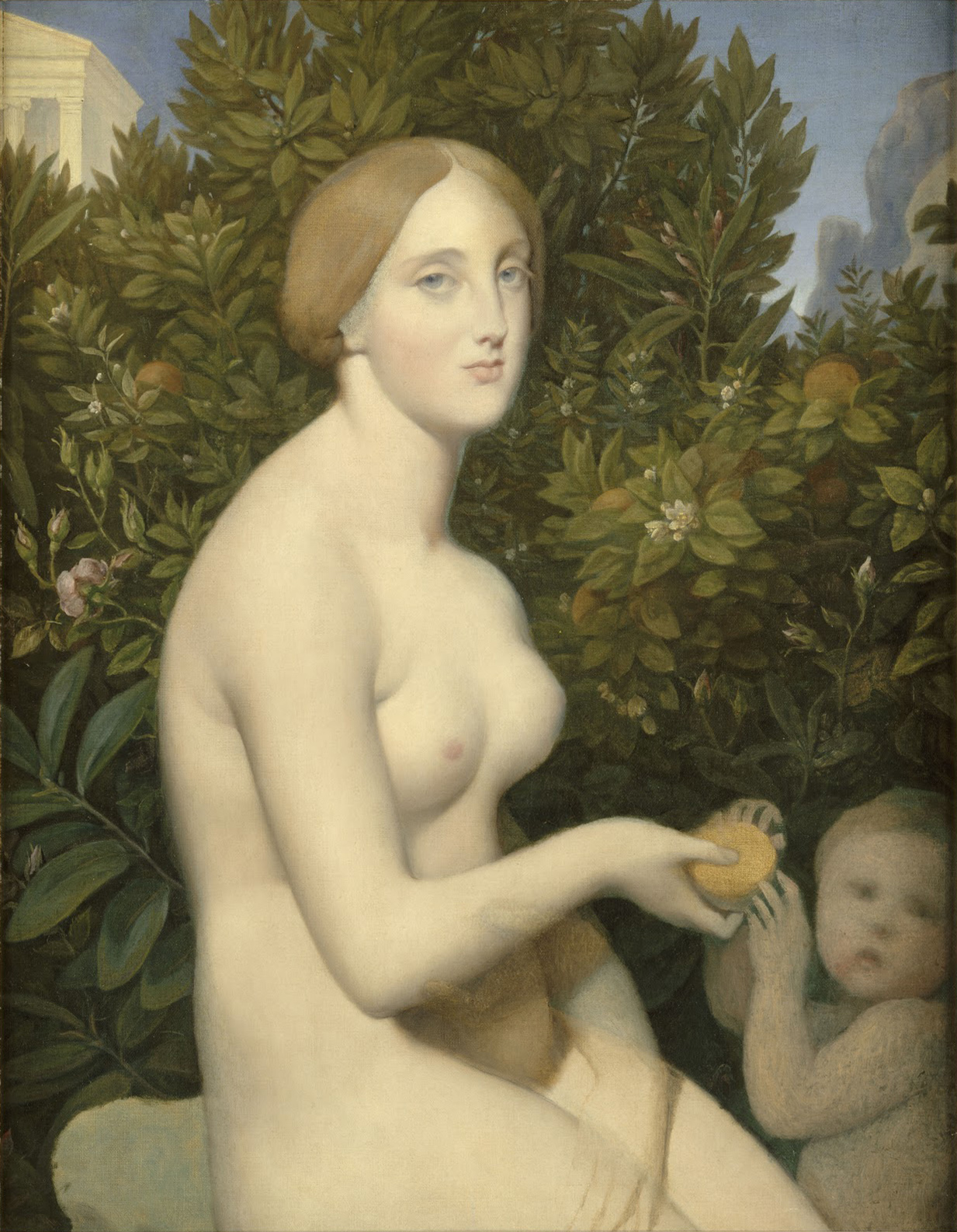 Ingres, Vénus à Paphos terminé par Alexandre Desgoffe, 1852 musée d'Orsay